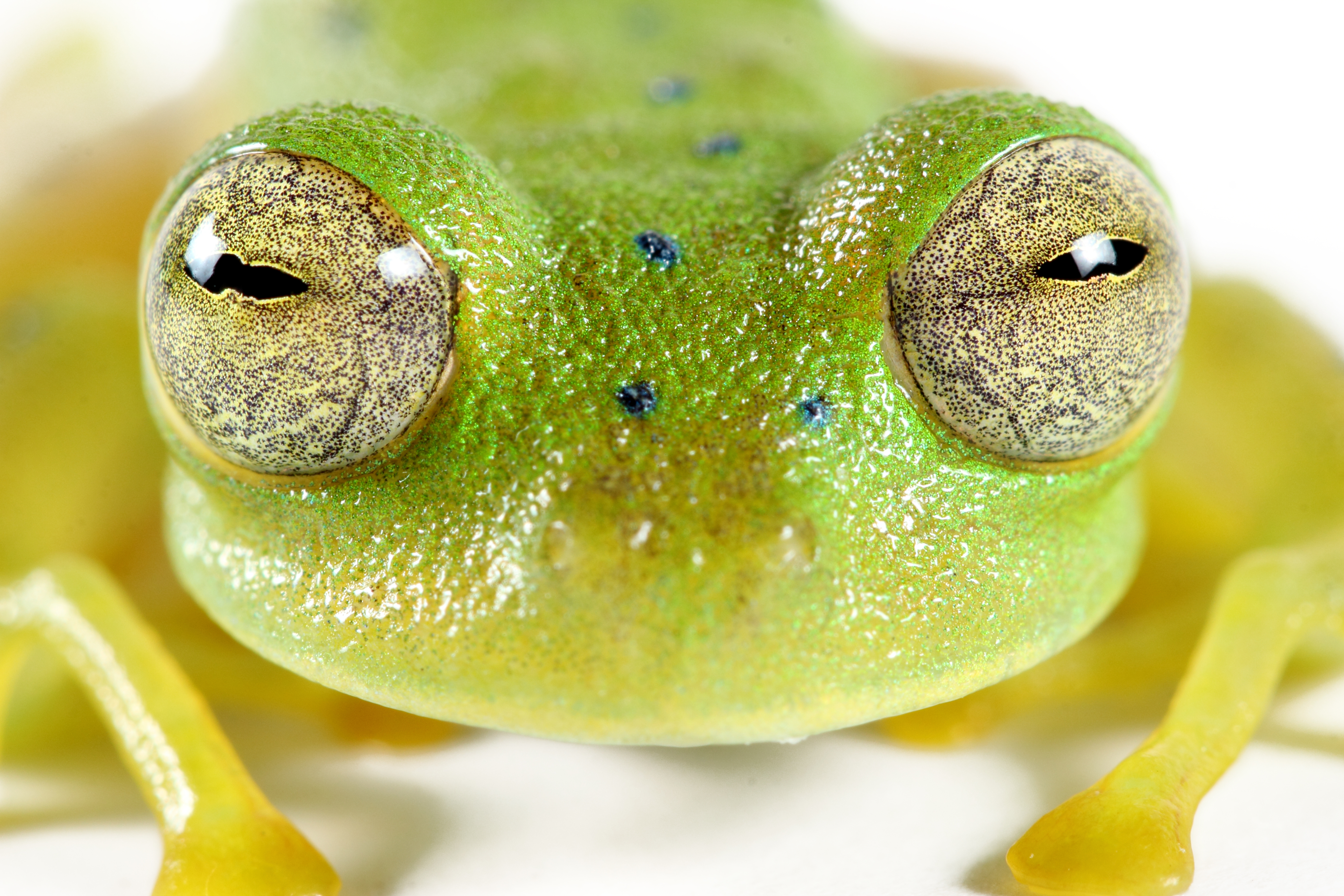 Nymphargus cochranae from Zamora, Ecuador